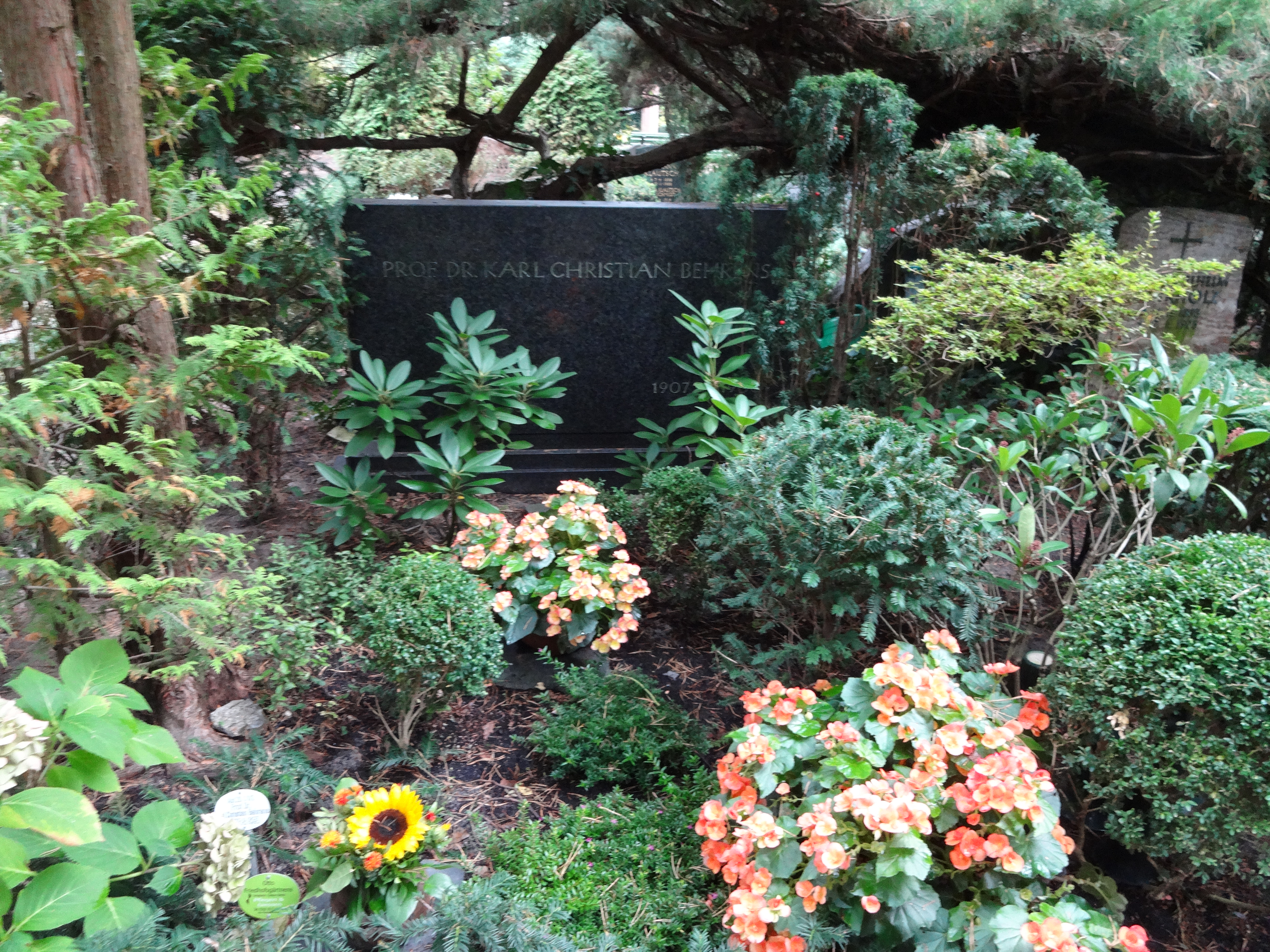 Grab von Prof. Karl Christian Behrens auf dem Waldfriedhof Dahlem in Berlin